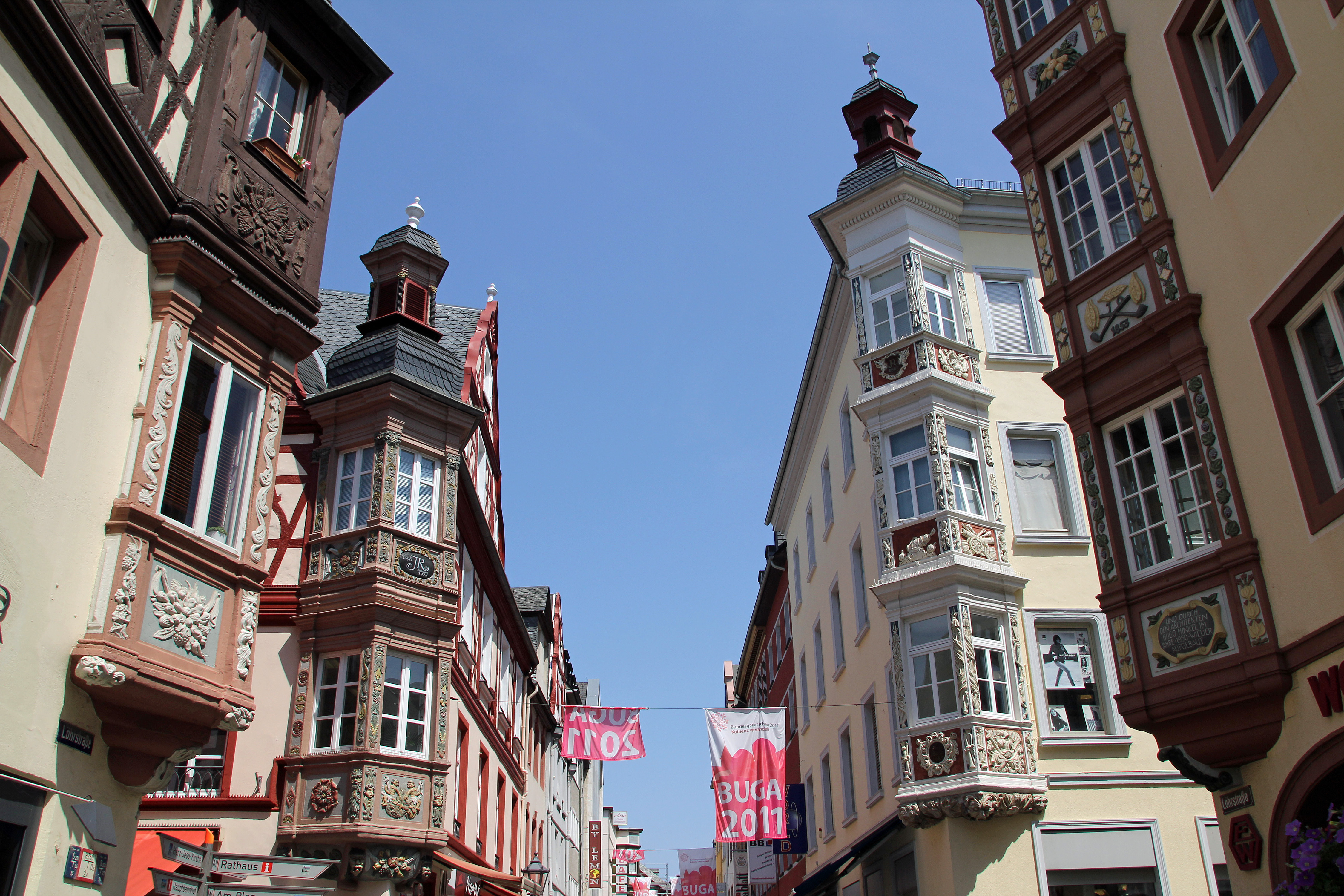 Koblenz im Buga-Jahr 2011 - Die Vier Türme